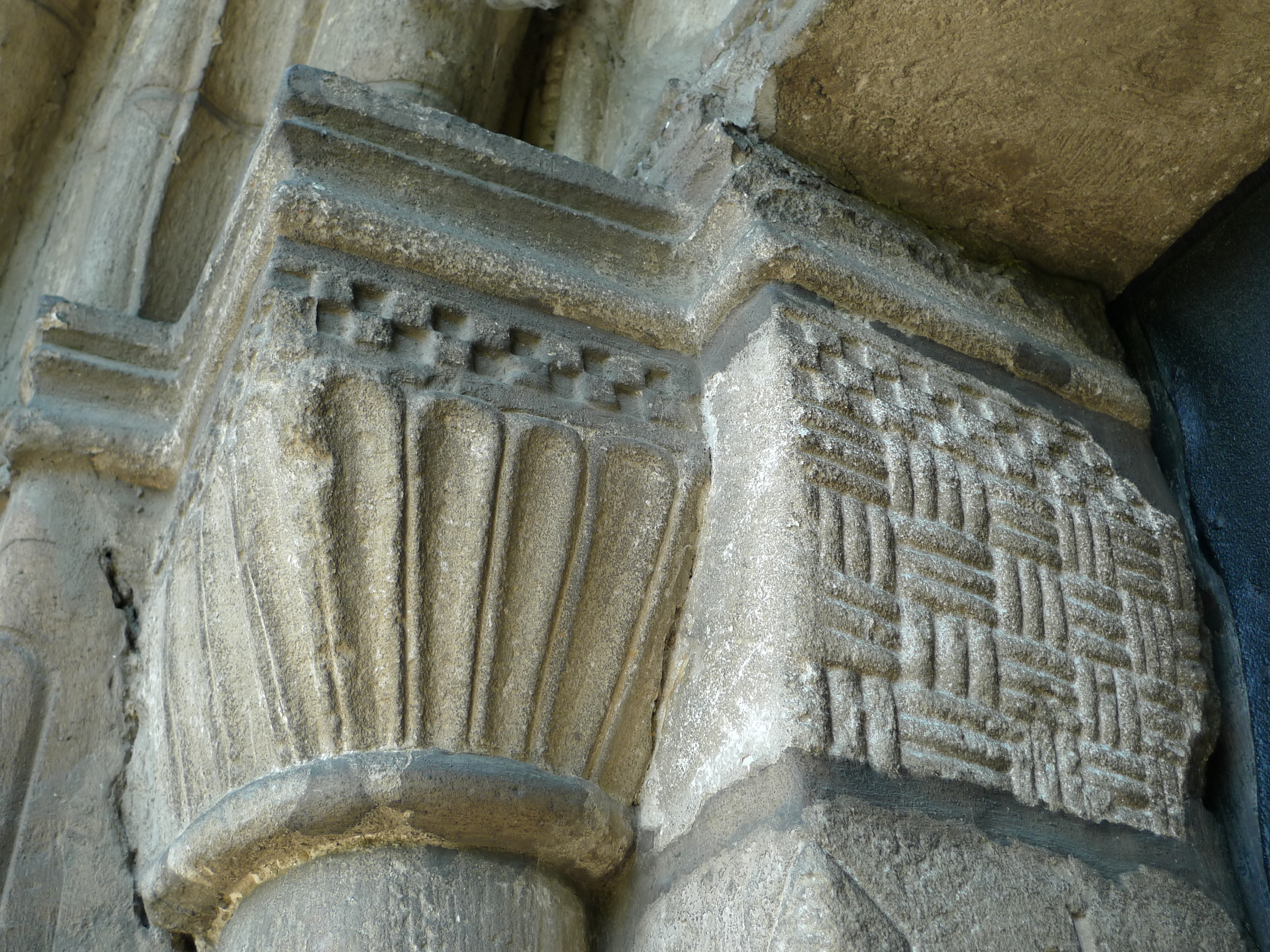 Carnuntum-Petronell Rundkapelle Portal